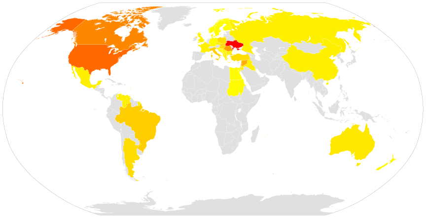 Países con jurisdicciones católicas de rito bizantino